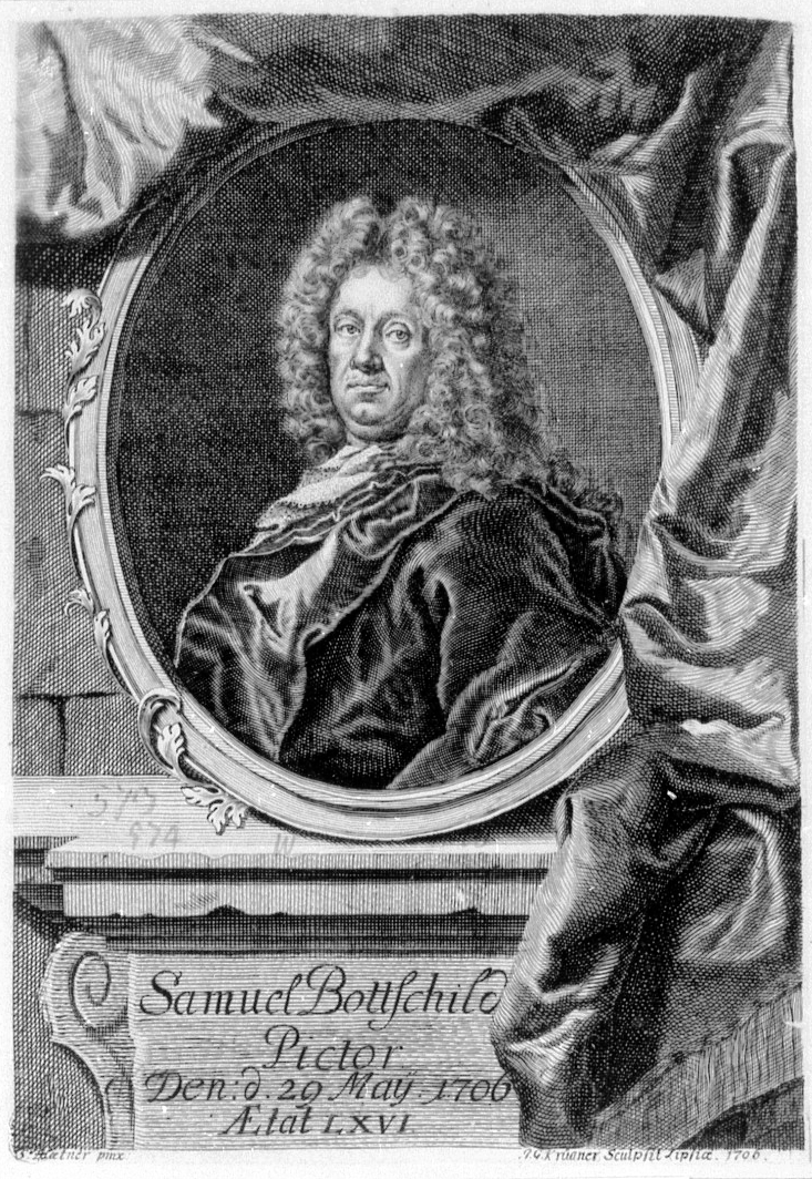 Porrät des Maler Samuel Bottschild, Kupferstich (1706) von Johann Gottfried Krügner (der Ältere) nach einer Vorlage von Hans Samuel von Blättner, Dresden, Staatliche Kunstsammlungen Dresden, Kupferstich-Kabinett